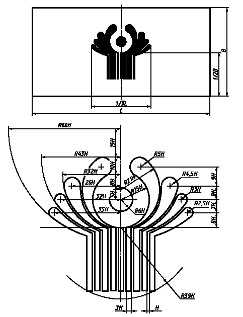 Схема построения фигуры флага СНГ. H = 0,0044 L